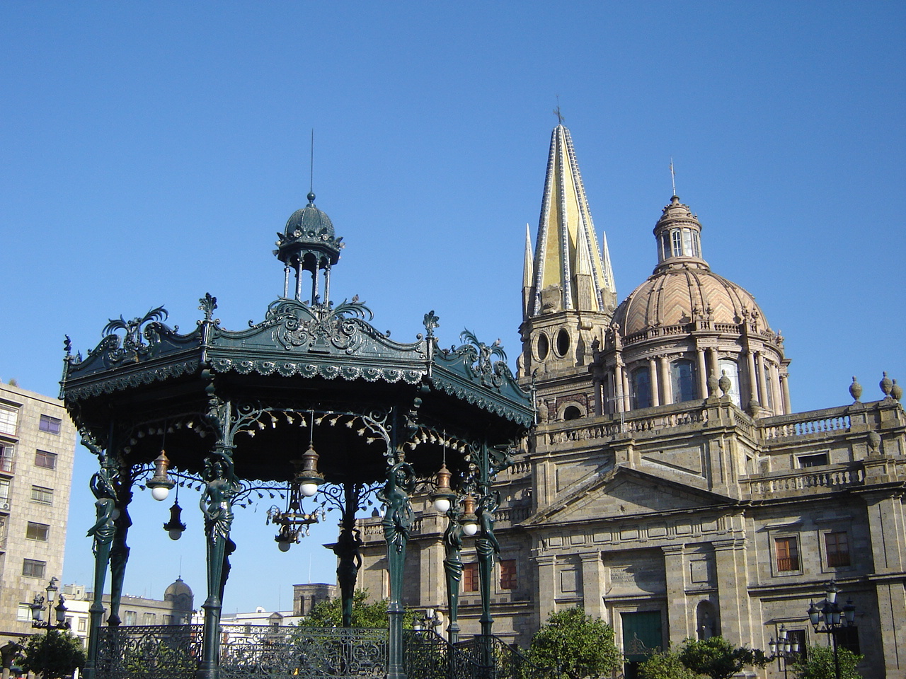 Catedral de Guadalajara vista desde la plaza de armas, donde además aparece el kiosco representativo de dicha plaza.